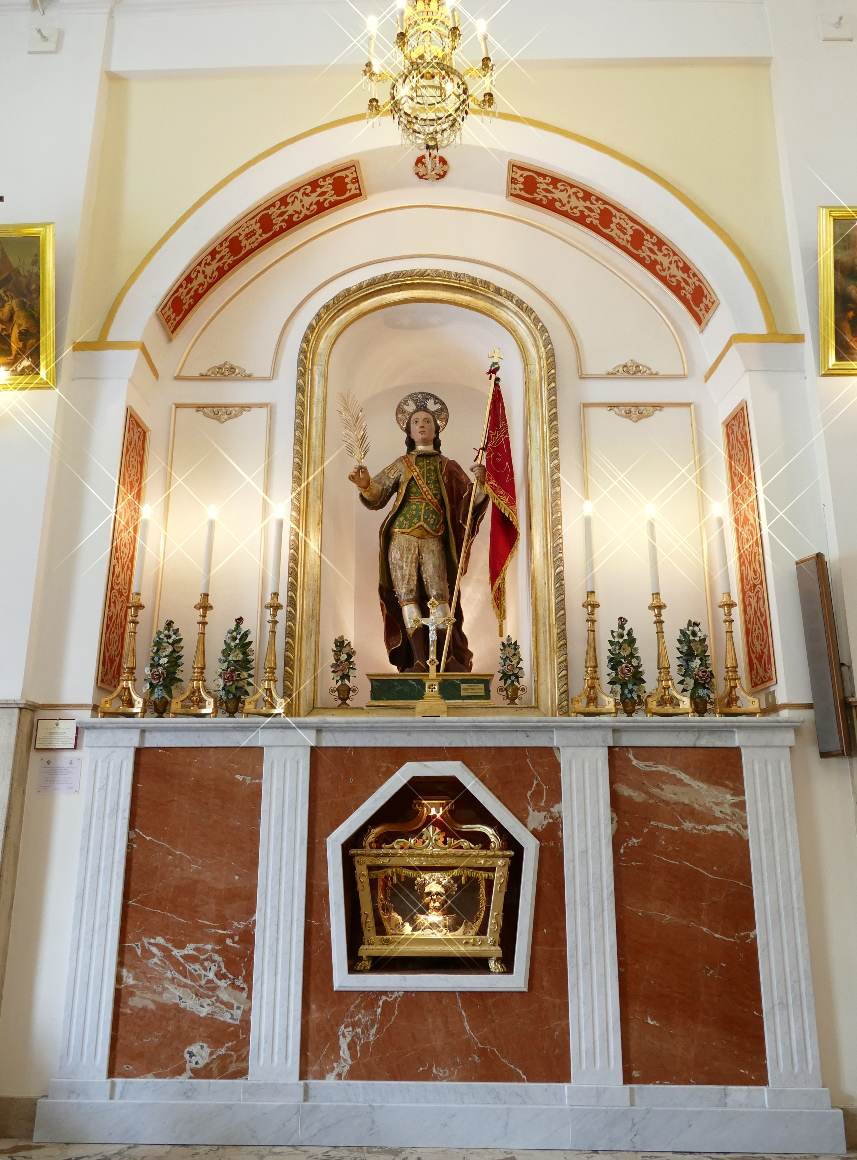 Altare di San Prospero martire patrono di Catenanuova